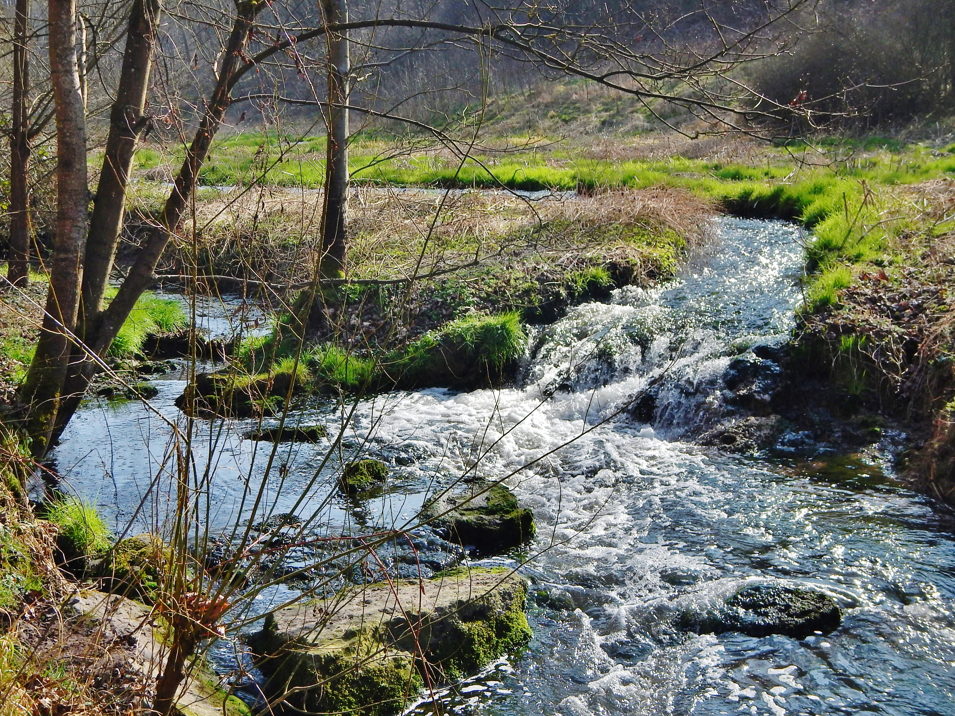 Der Leudelsbach circa 1300 Meter vor seiner Mündung in die Enz.